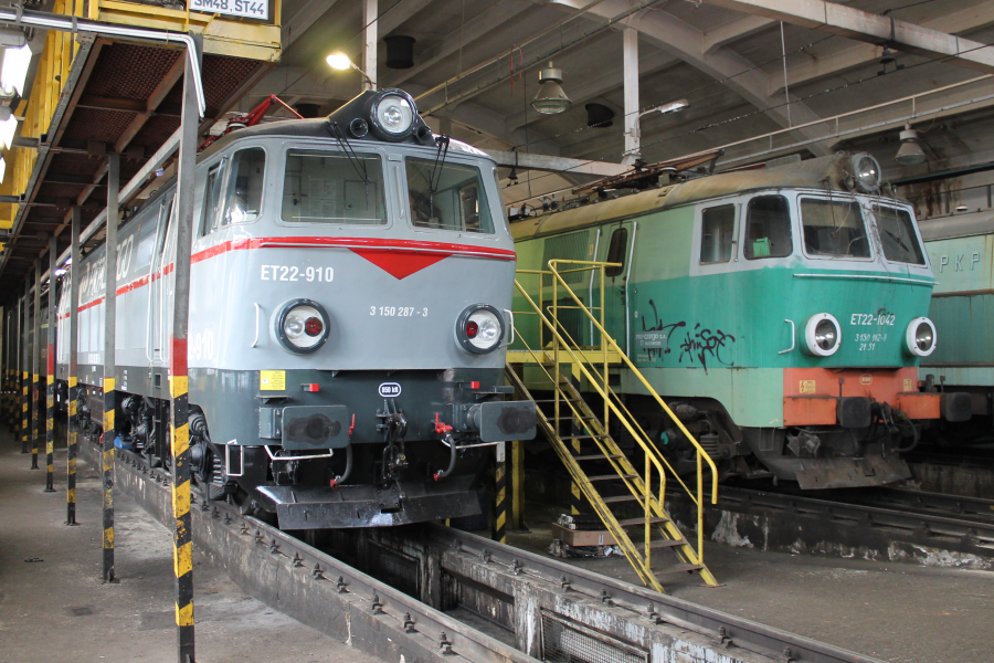 Elektrowóz ET22-910, prezentujący nowe szaro-czerwone barwy PKP Cargo, stoi w jednej z hal na terenie Zakładu Centralnego spółki w Warszawie.